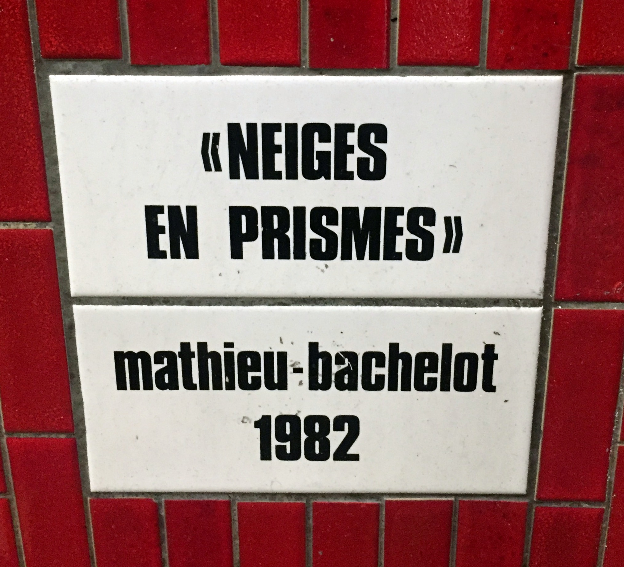 Neiges en prisme - Mathieu-Bachelot - 1982 : descriptif d'œuvre dans la station de métro parisienne Marcadet - Poissonniers.